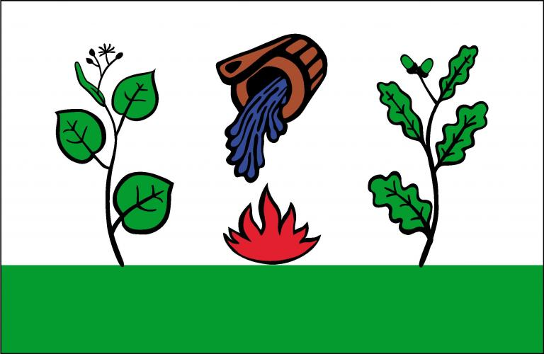 vlajka, Krasíkov, okres Ústí nad Orlicí